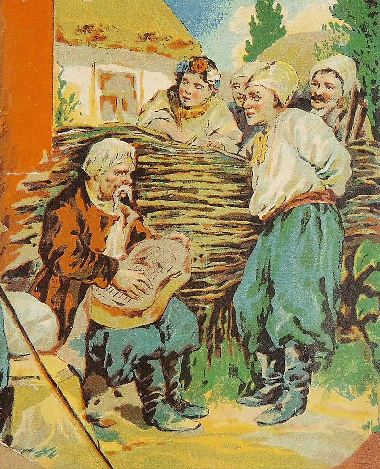 Кобзарь Перебендя: Собрание малороссийских песен. — М.: А.Д. Сазонов, 1901. — 144 с.